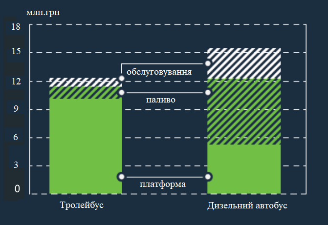 Порівняння вартості експлуатації тролейбуса і дизельного автобуса